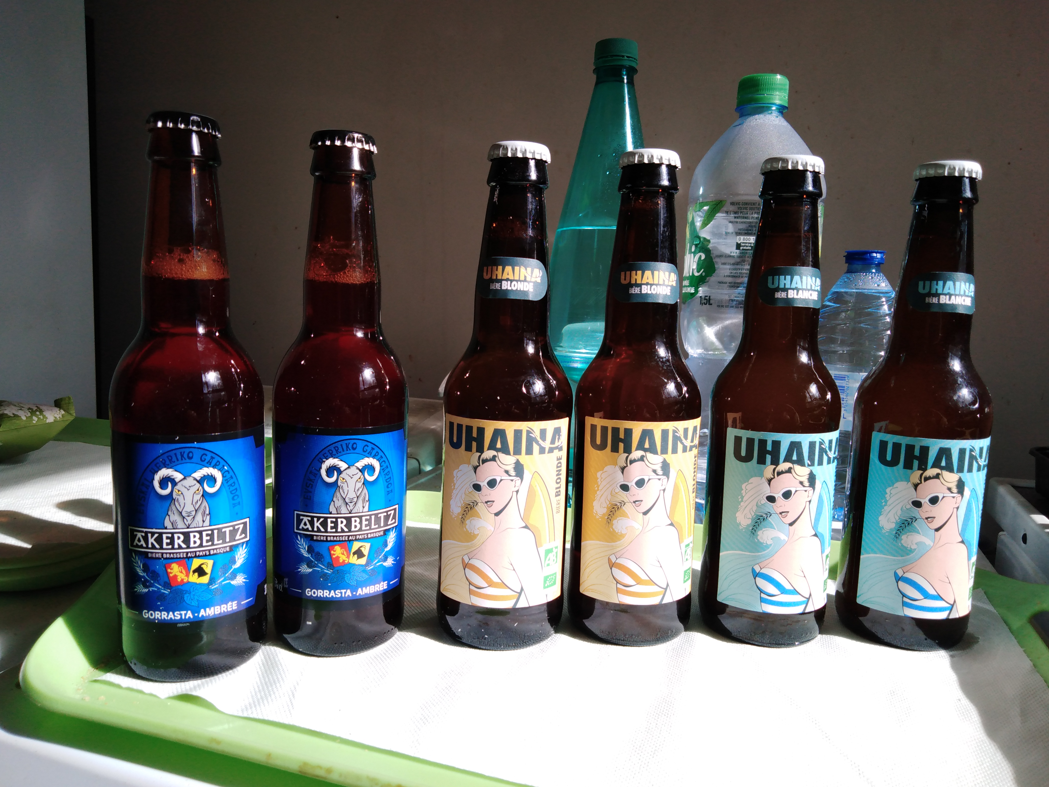 Bieroj Akerbeltz kaj Uhaina el Eŭskio